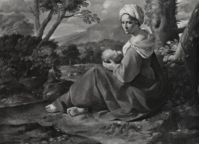 Riposo nella fuga in Egitto, olio su tela, Galleria Doria-Pamphilj, Roma